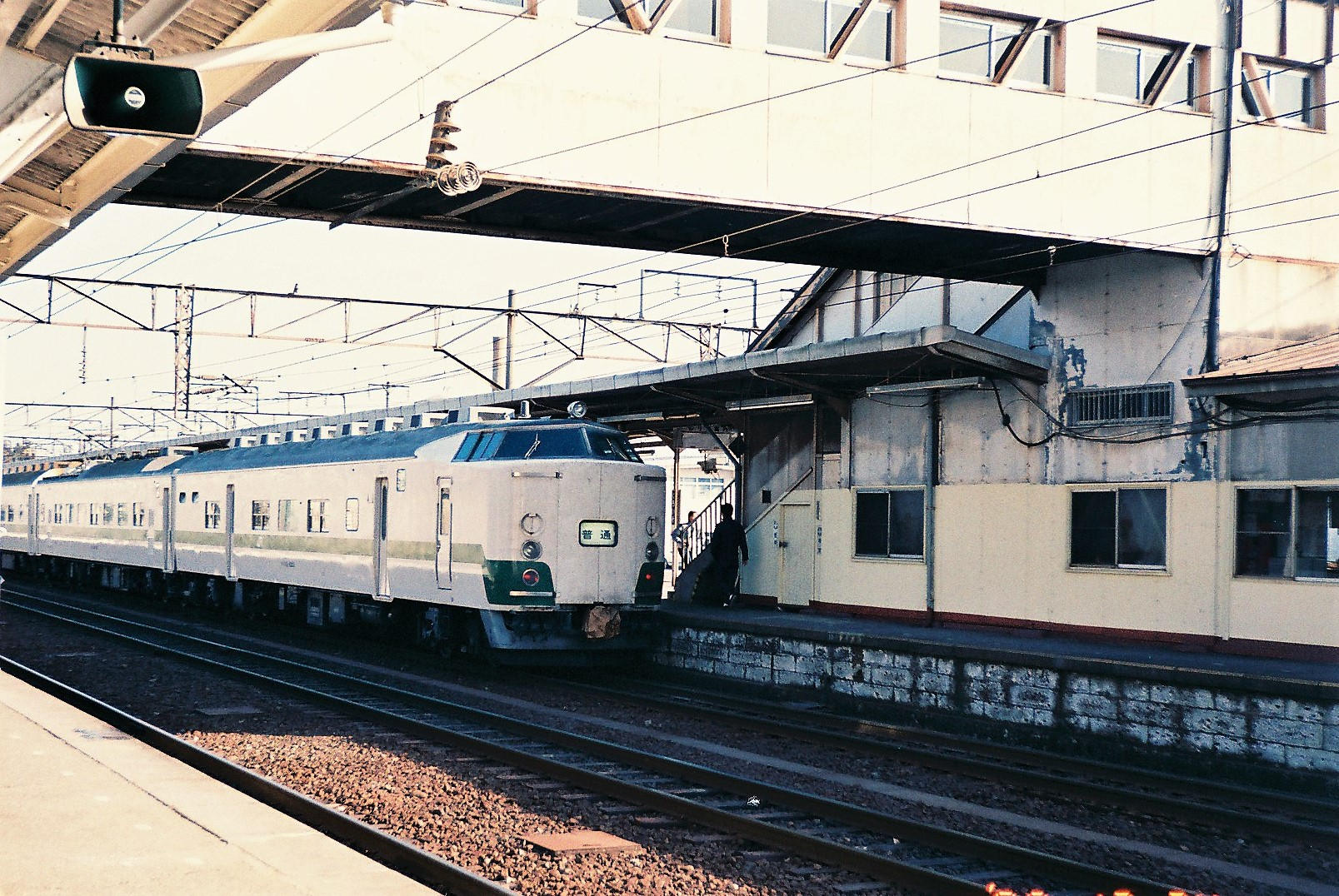 黒磯駅に停車中のクハ715形1000番台（1987年12月撮影）